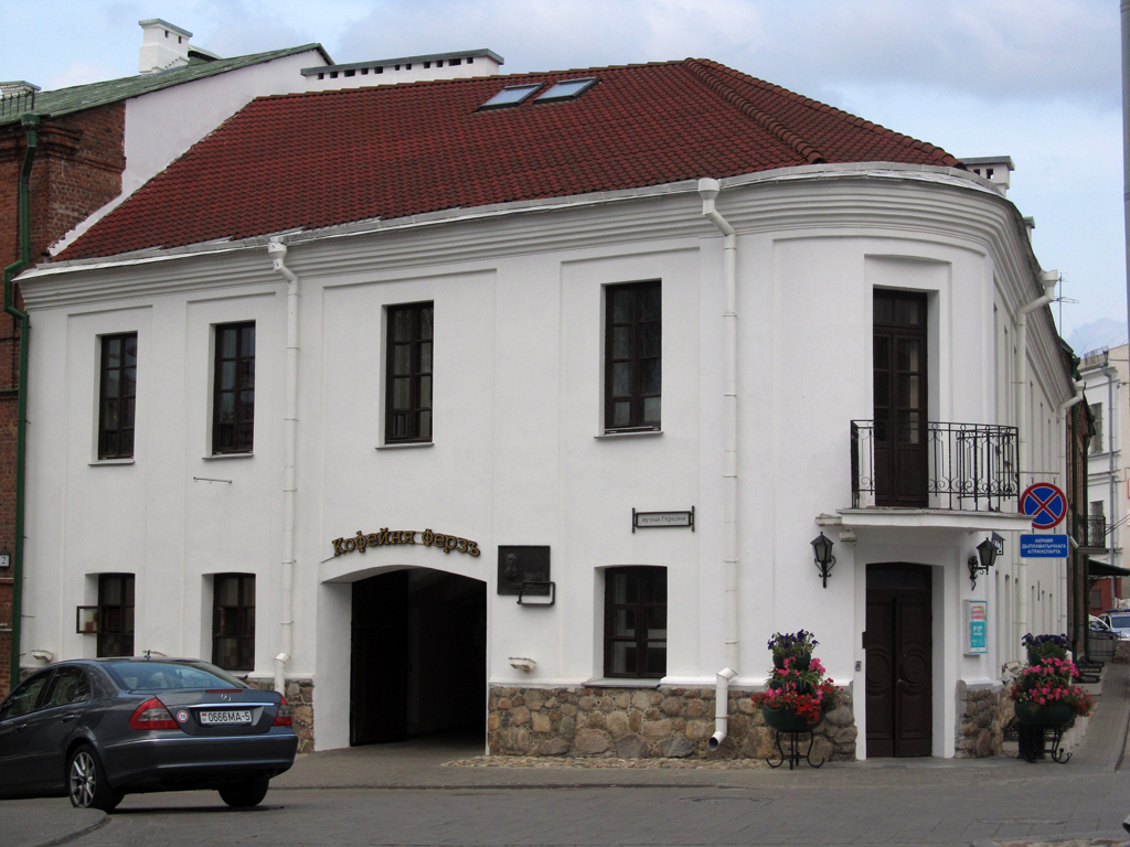 Мінск. Завулак Музычны, 1